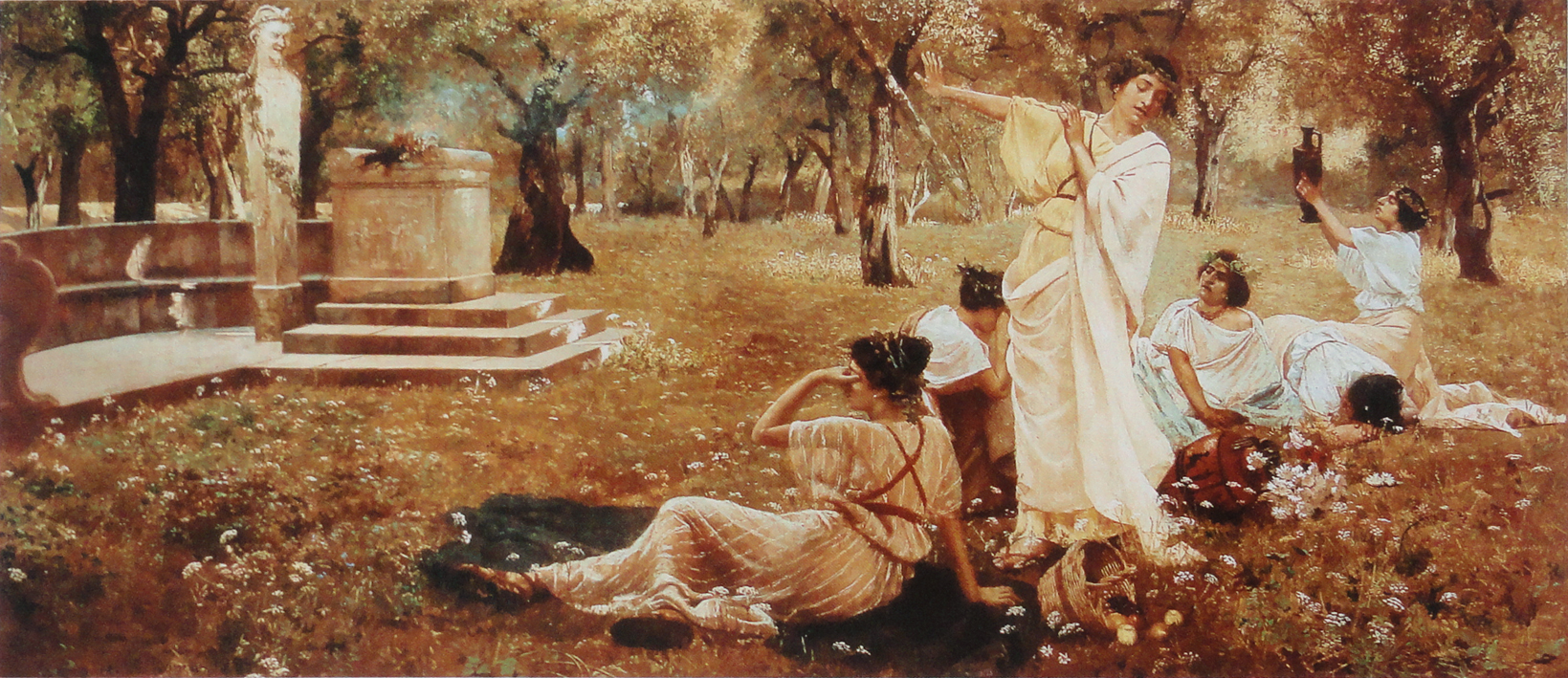 Oferenda ao deus Pã, óleo sobre tela, 41,5 x 90cm, coleção particular